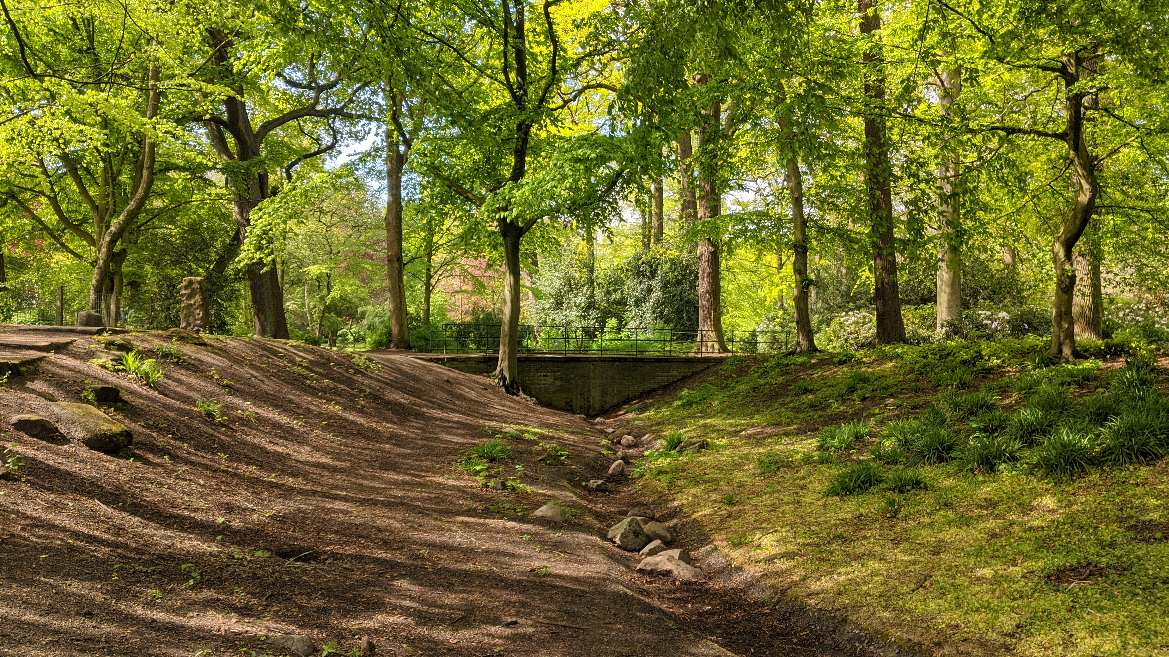 Hammer Park in Hamburg-Hamm, Frühjahr 2020